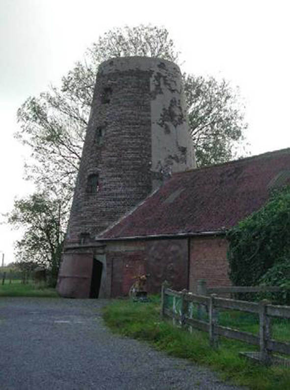 Anzegem Heirbaan 2